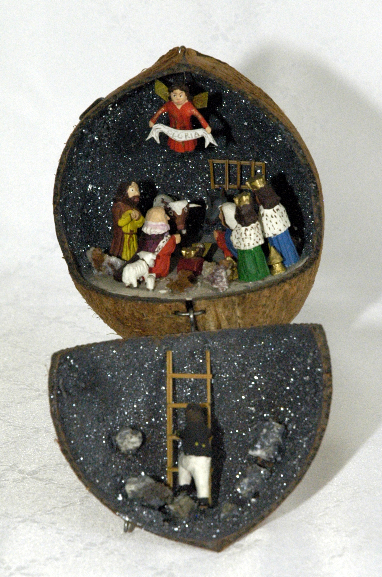 Weihnachskrippe in der Nußschale aus der Sammlung Schreiber